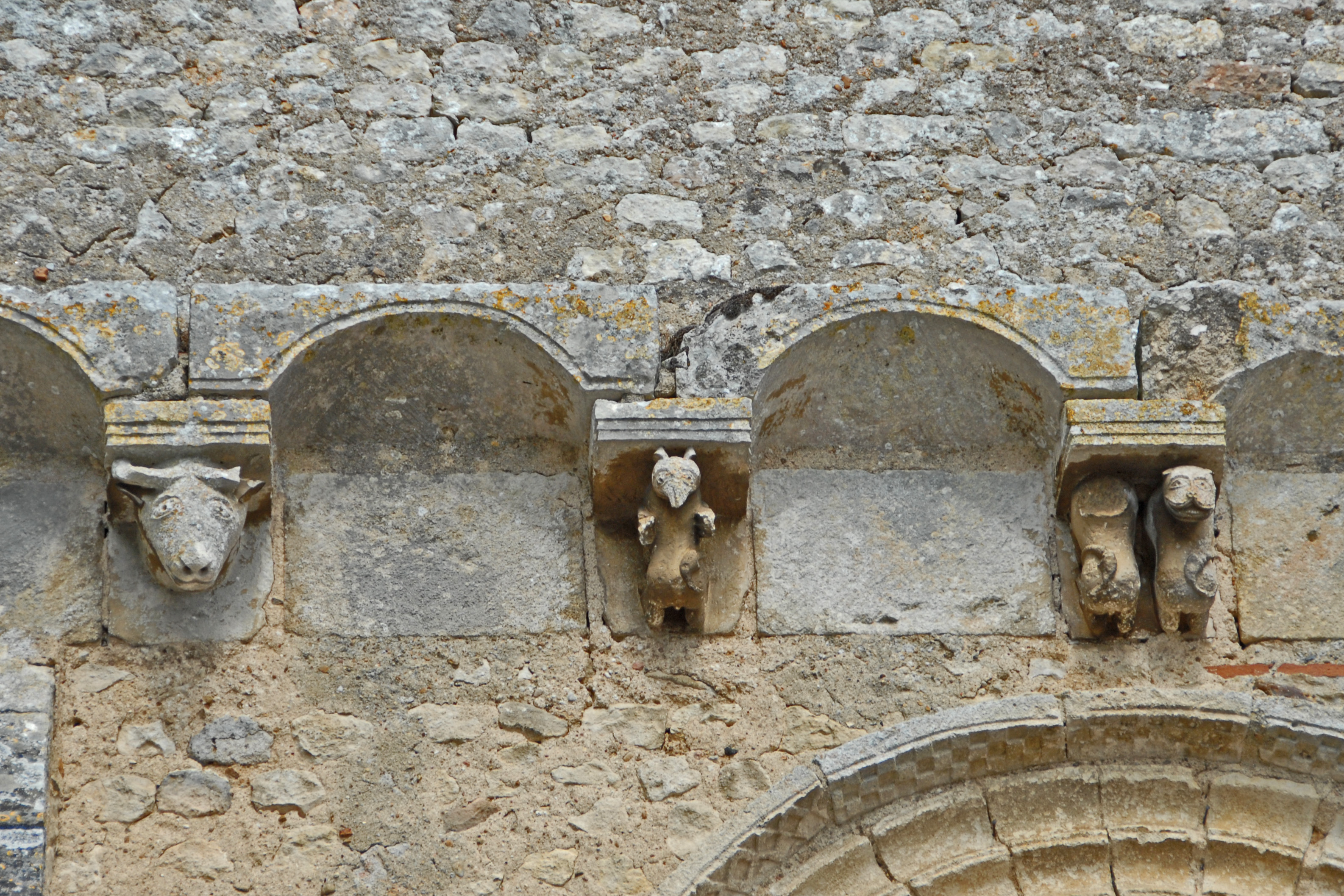 Civaux, Kirche, Fassade, Kragsteine